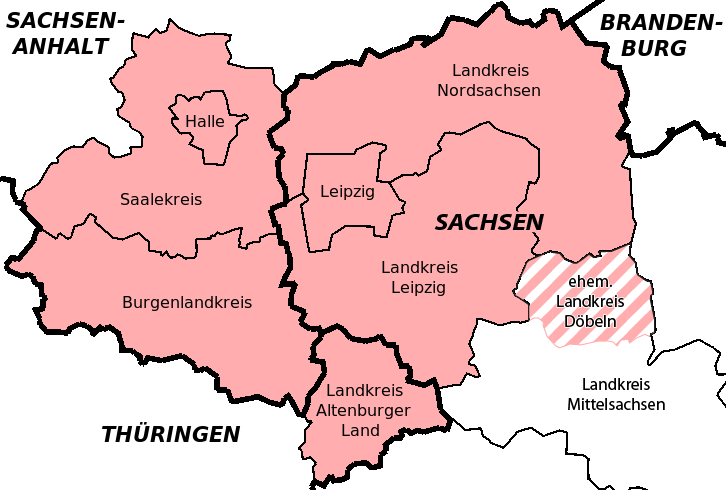 Grafik zeigt das Gebiet in Sachsen, Sachsen-Anhalt und Thüringen, das zum Mitteldeutschen Verkehrsverbund gehört.